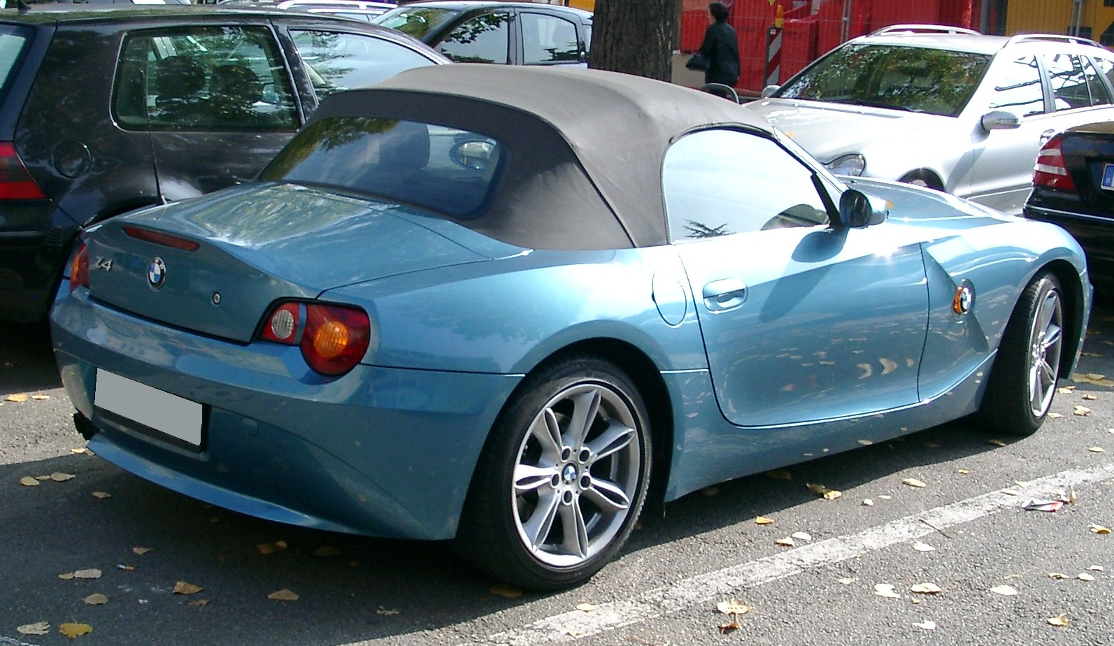 BMW Z4